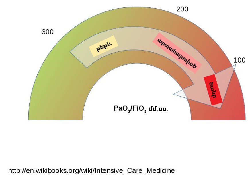 ՍՇԴՀ-ի ծանրության աստիճանի գնահատումը ըստ Բեռլինյան չափորոշիչների